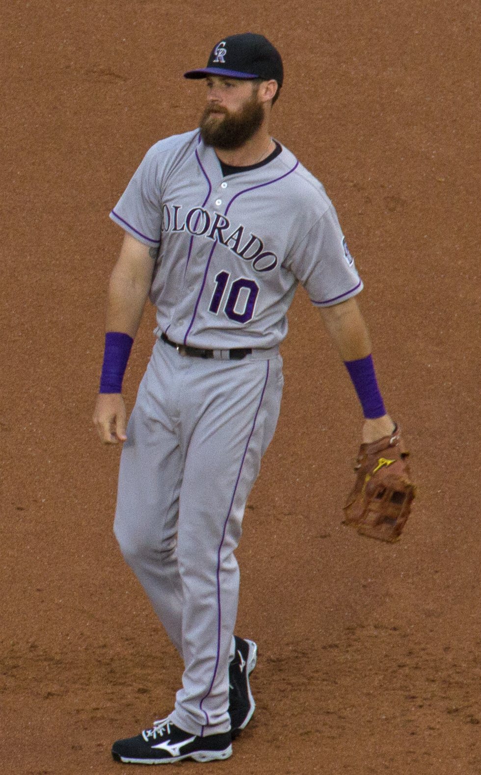 Ben Paulsen